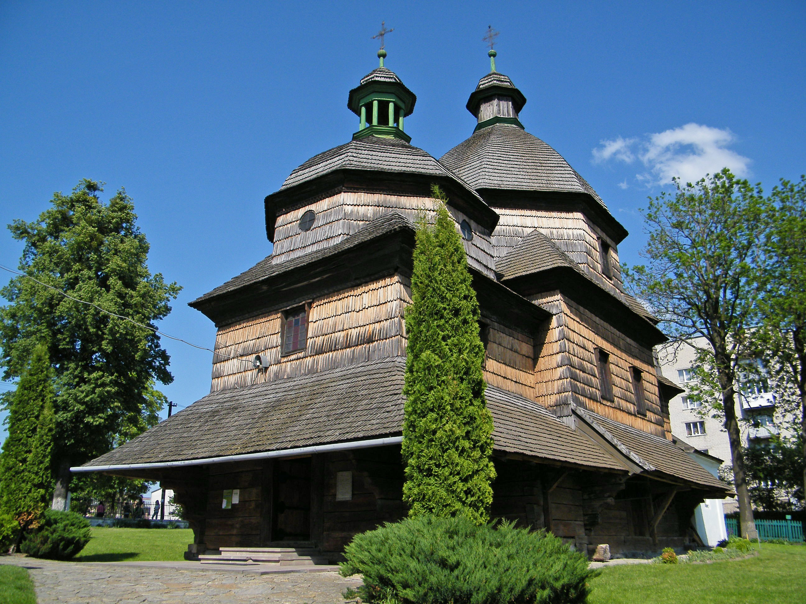 Деревянная Троицкая церковь